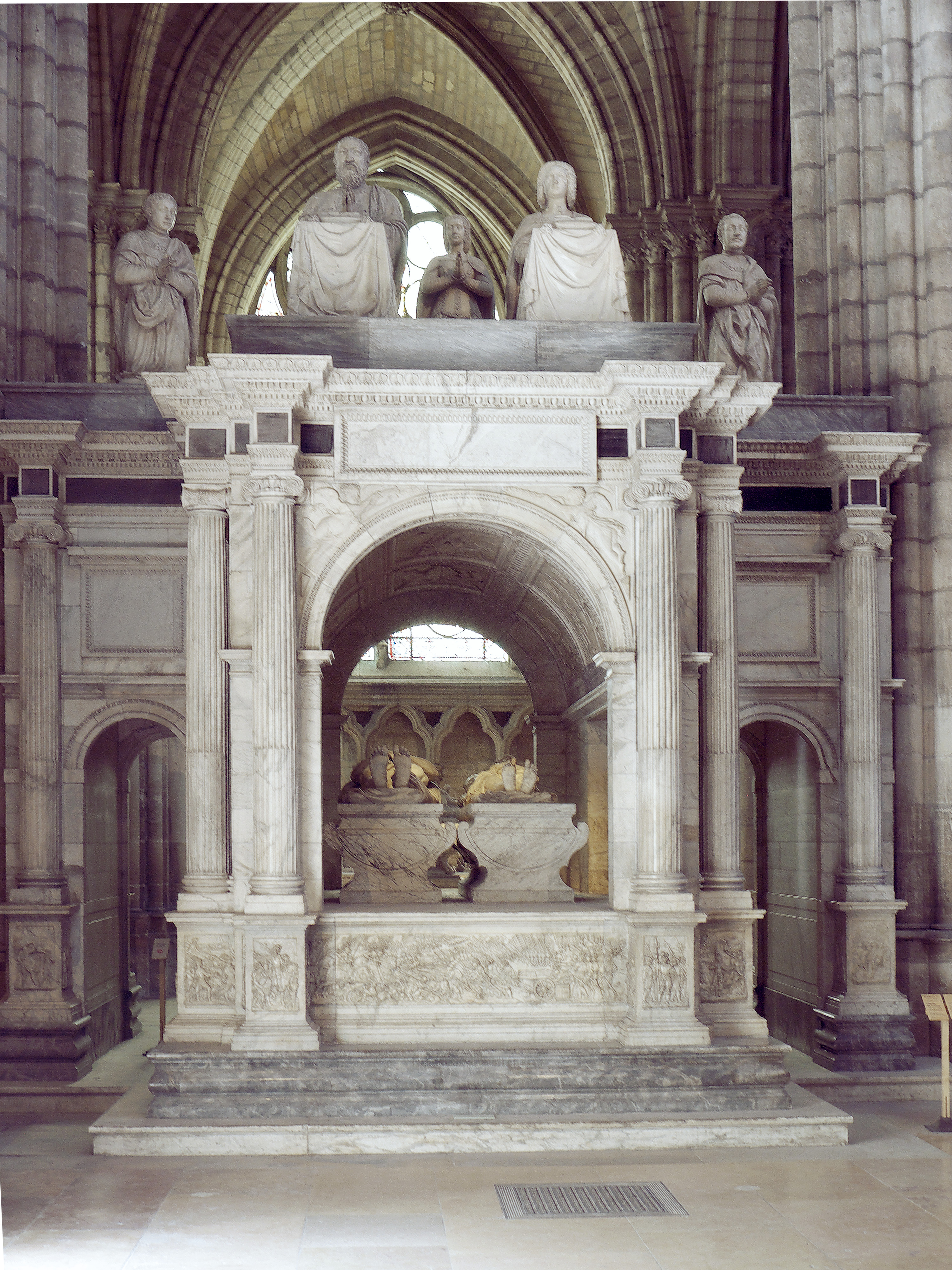 Tombeau de François Ier et de Claude de France, dans la basilique Saint-Denis (France). .